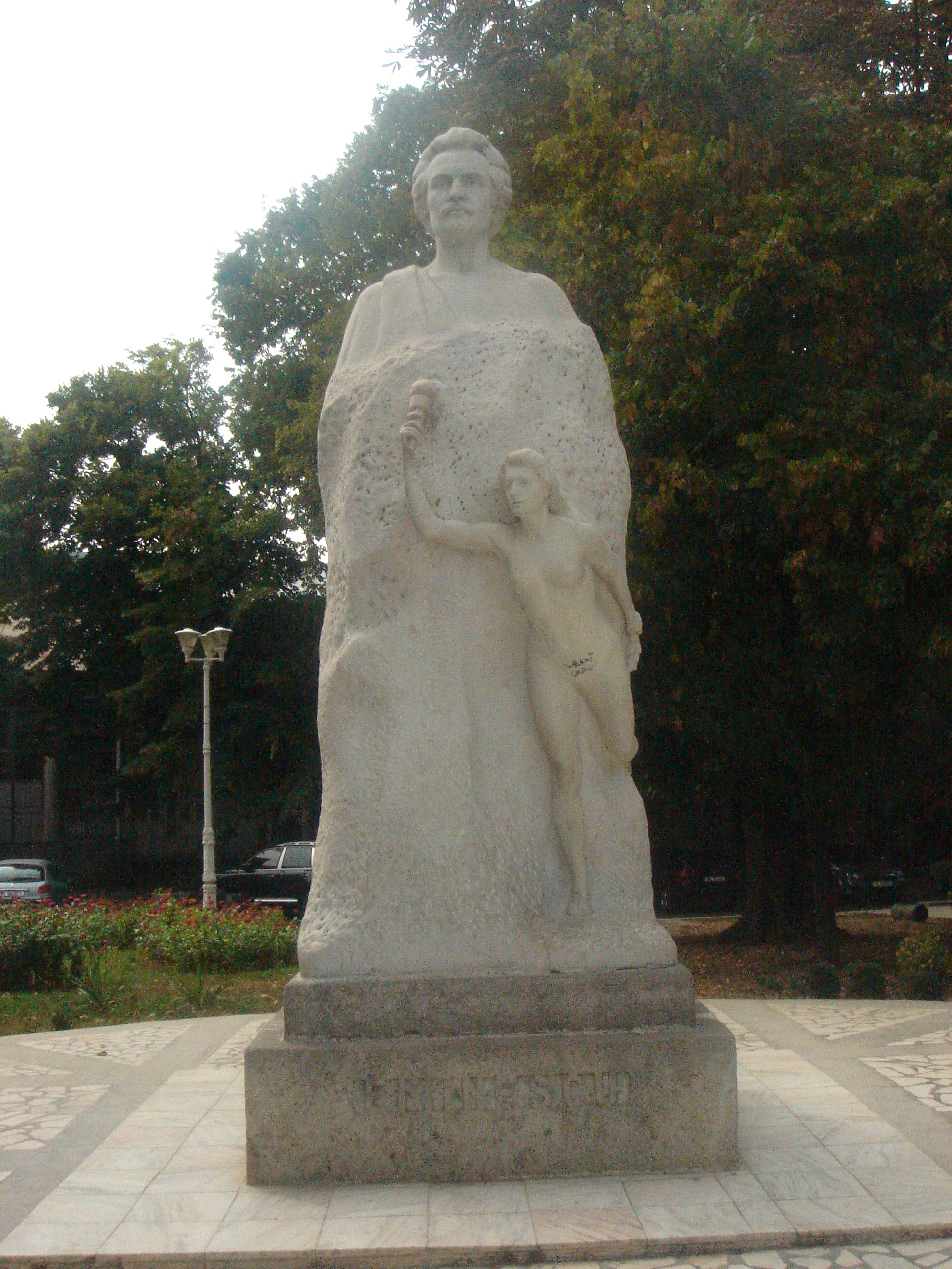 Monumentul lui Mihai Eminescu, cunoscut de galateni ca statuia lui Eminescu, a fost prima din tara ce l-a infatisat pe Poetul National. Cativa copaci sunt de pe vremea lui Eminescu. Mana muzei lui Eminescu ce compune ansamblul statuar a fost furata de peste 12 ori, acum fiind refacuta de catre autoritati. Ansamblul a fost dezvelit in 1911 si apartine lui Frederik Stork.